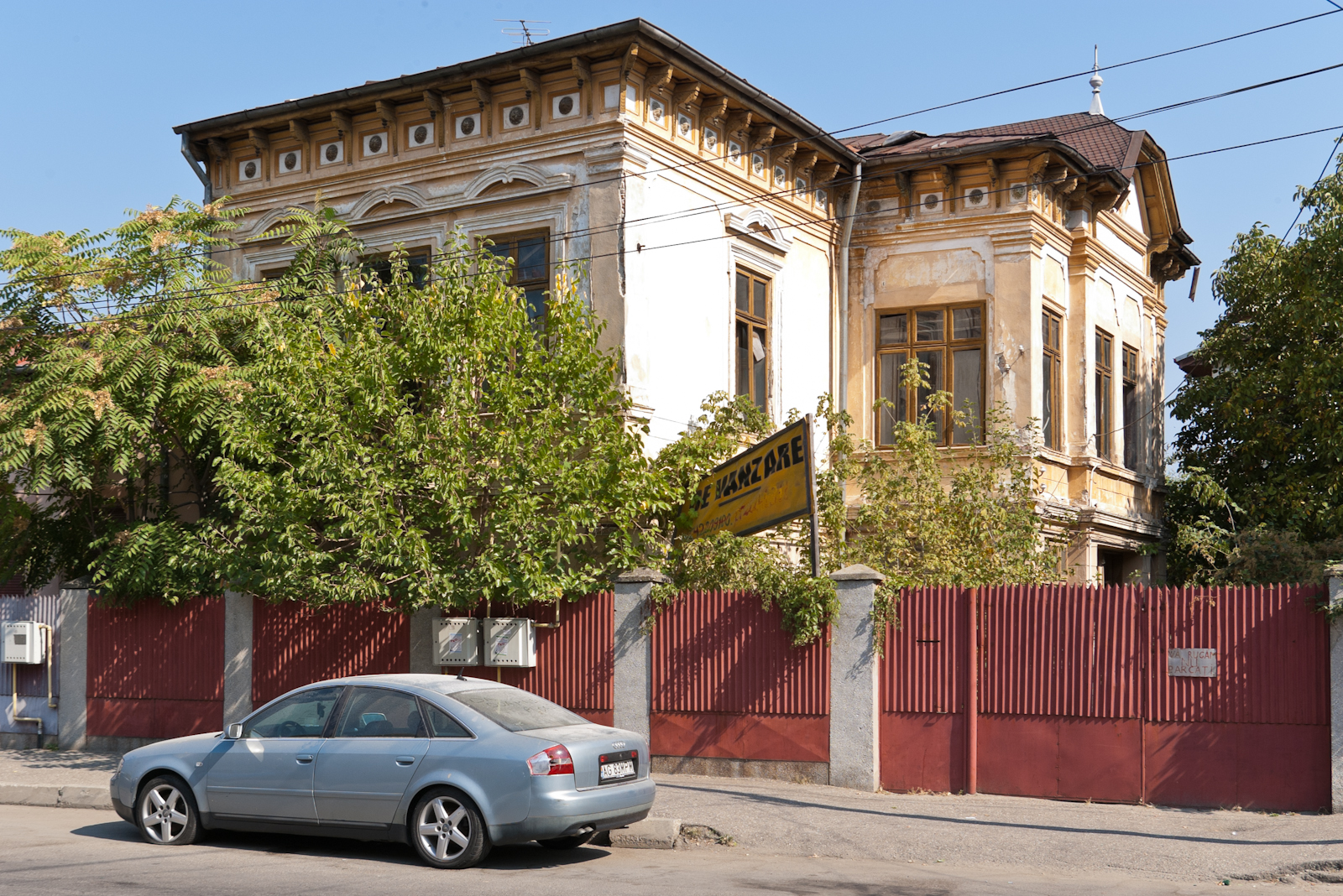 Fotografia prezintă casa de pe str. Victoriei nr. 62 (64 cf. primăriei) văzută dinspre SE.